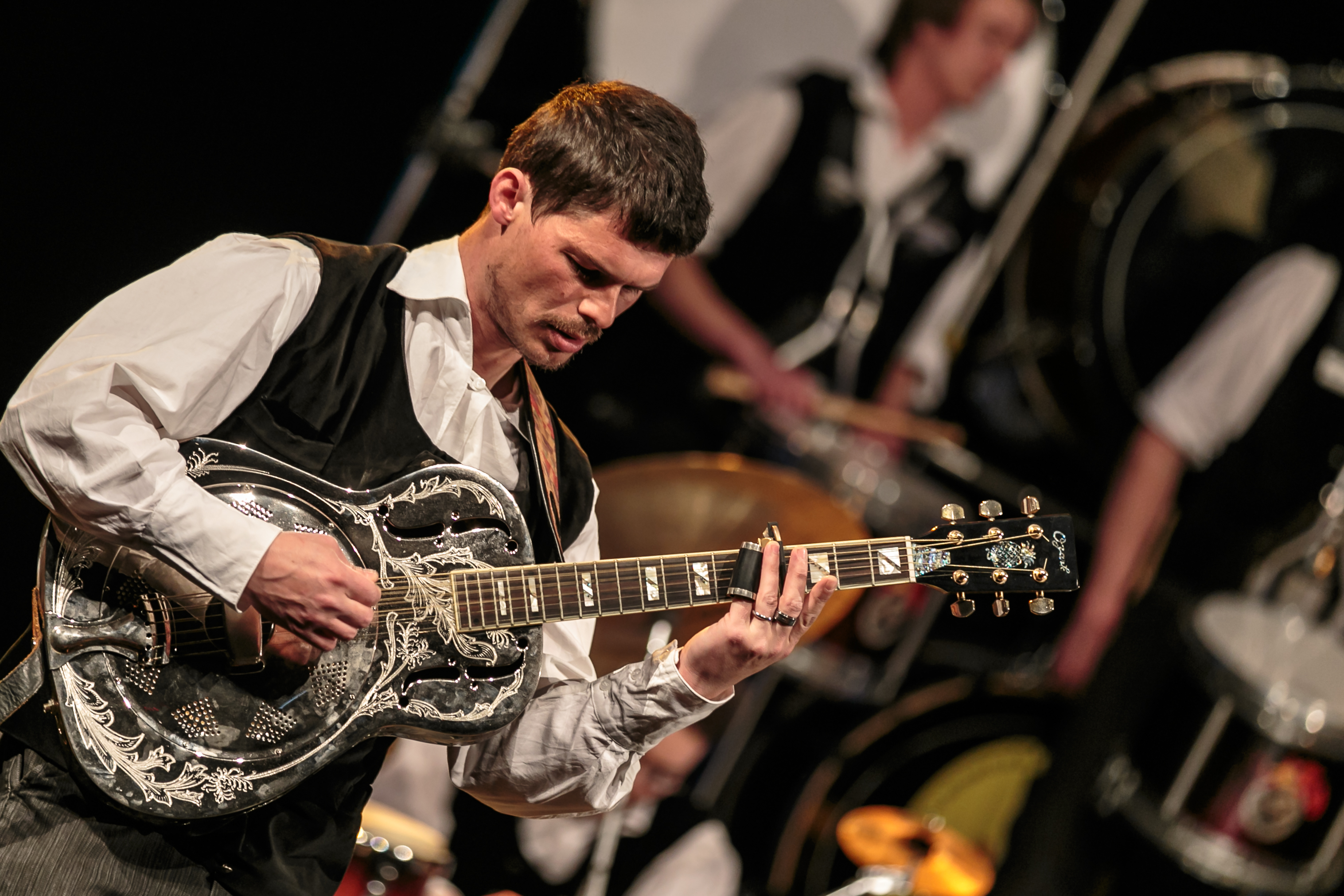 Prestation du bagad Sonerien Bro Dreger pour les 21 ans du bagad Bro An Aberioù à Plabennec le 16 avril 2016.